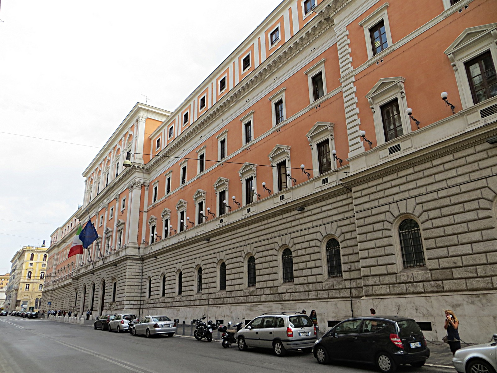 Palazzo Esercito, sede dello stato maggiore della Difesa a via XX Settembre 123, Roma